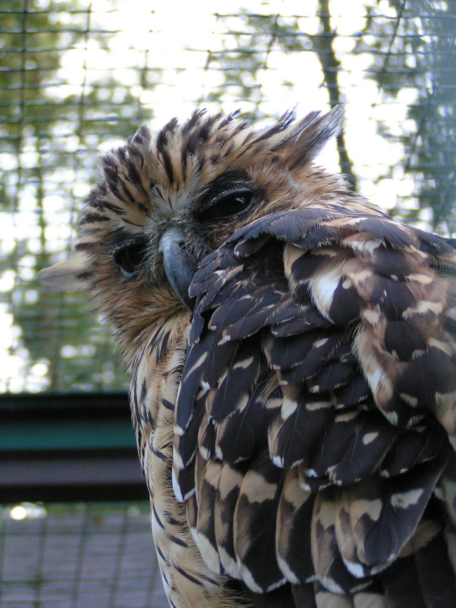 Sunda fishing owl (Bubo ketupu javanensis, Kétoupa malais, Sunda-Fischuhu) at Vogelpark (bird park) Walsrode, Germany